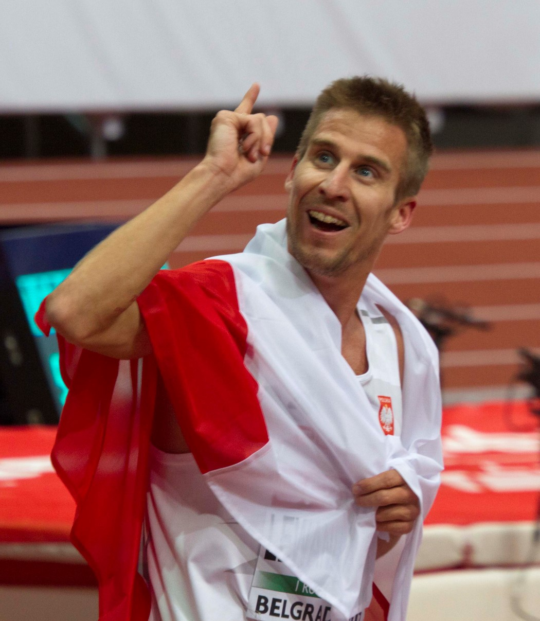 Marcin Lewandowski, finale 1500 m.